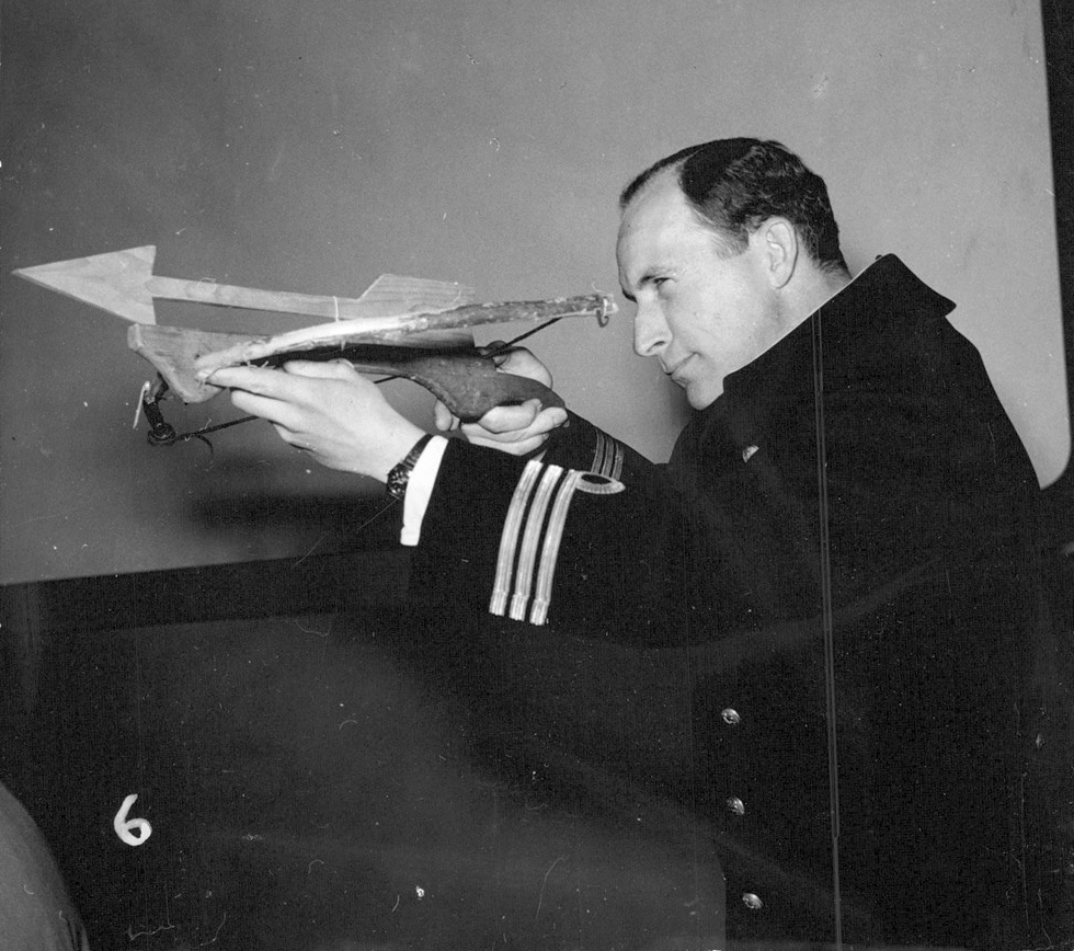 Kapten Einar Zacke i Marinstaben granskar ett leksaksarmborst som lämnats in till marinlottornas utställning "Barnens värld". Öppnas i Nordiska museet 7 maj.